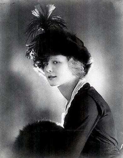 Marilyn Miller